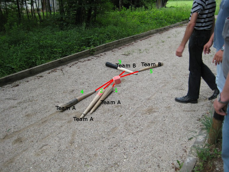 Auswertung der Knittelpunkte